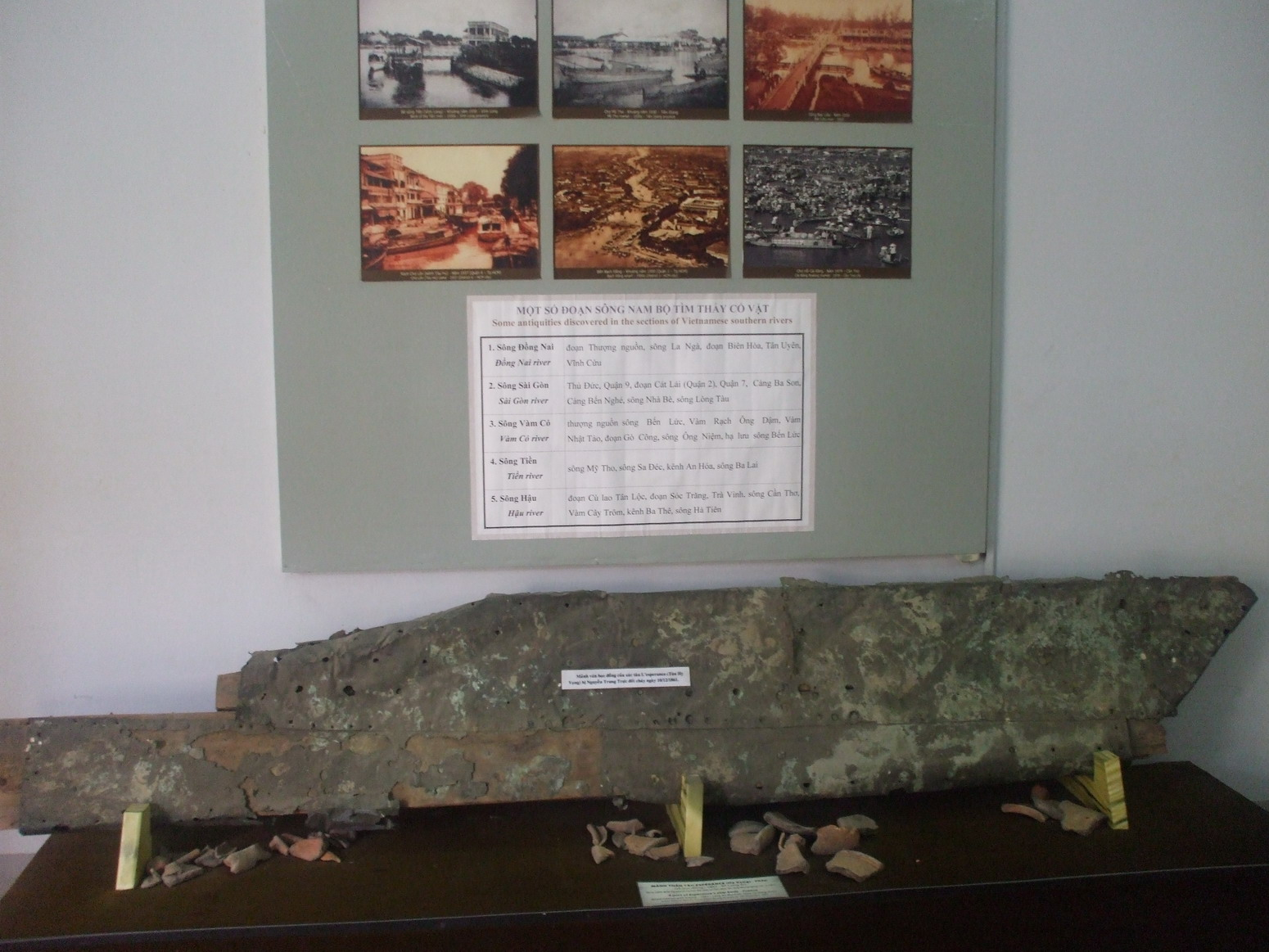 Mảnh ván tàu còn lại của tiểu hạm Espérance (Pháp), đã bị nghĩa quân của Nguyễn Trung Trực đánh chìm ngày 10 tháng 12 năm 1961 tại vàm sông Nhật Tảo, Long An, Việt Nam.